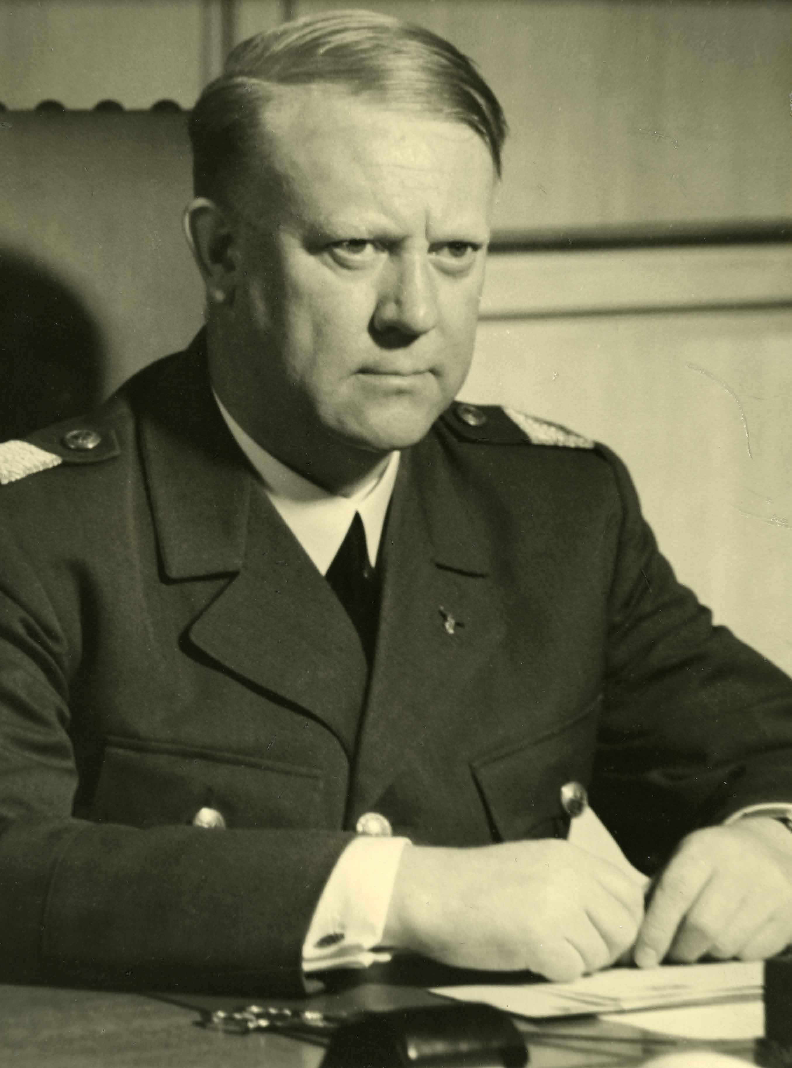 Portrett av Vidkun Quisling i uniform. Ukjent datering. RA/PA-0750/F/0013/1003